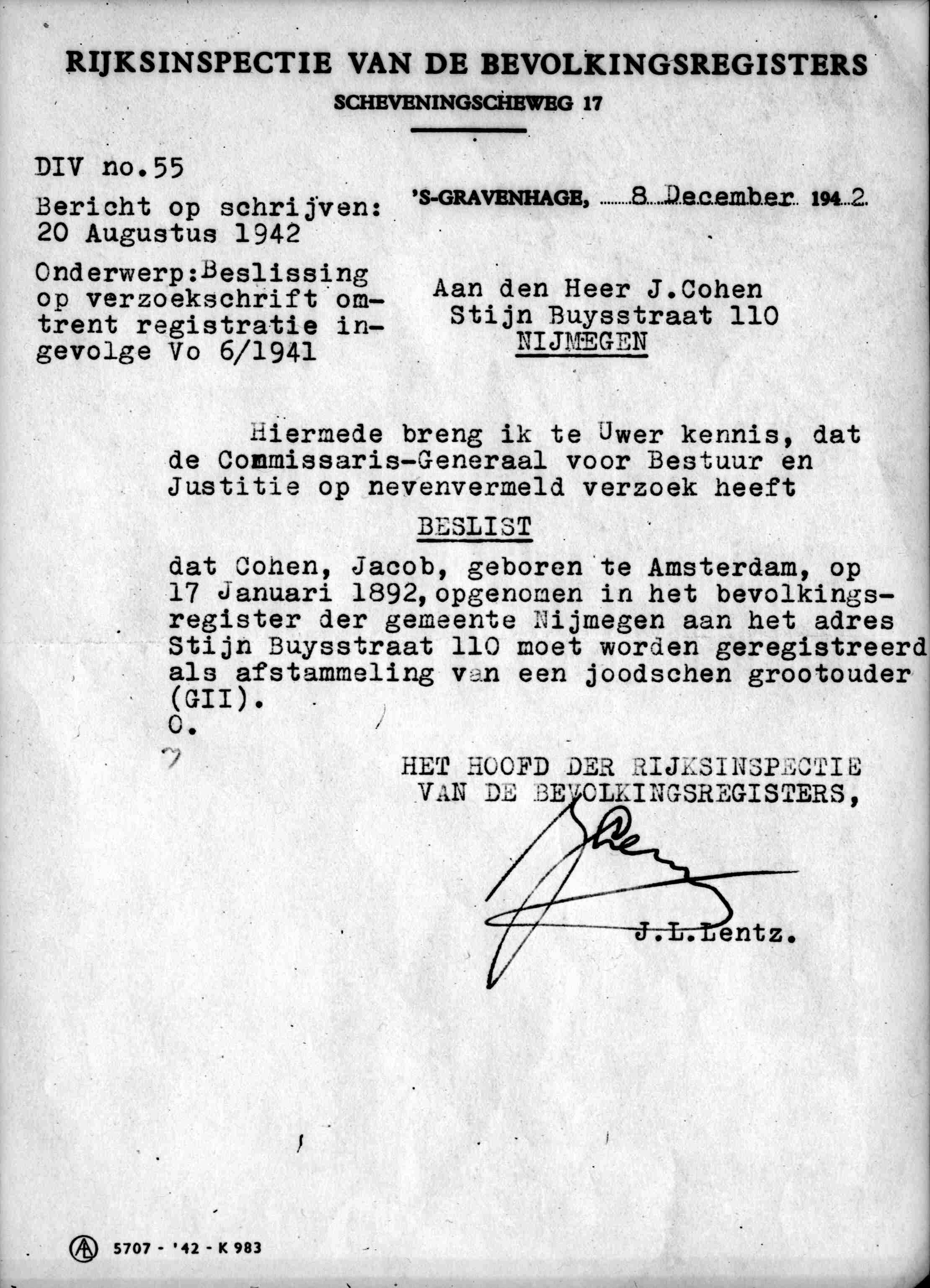 Een brief van de Rijksinspectie van de Bevolkingsregisters (d.d. 8-12-1942) gericht aan de heer J. Cohen, Stijn Buijsstraat 110 te Nijmegen, met de mededeling dat hij als jood staat geregistreerd 8-12-1942